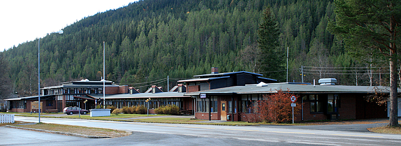 Engerdal kommunehus